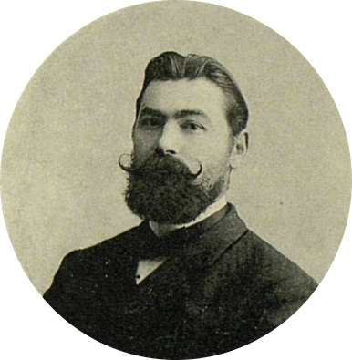 Иван Федосеевич Кадацков, член III Государственной думы от Области Войска Донского.